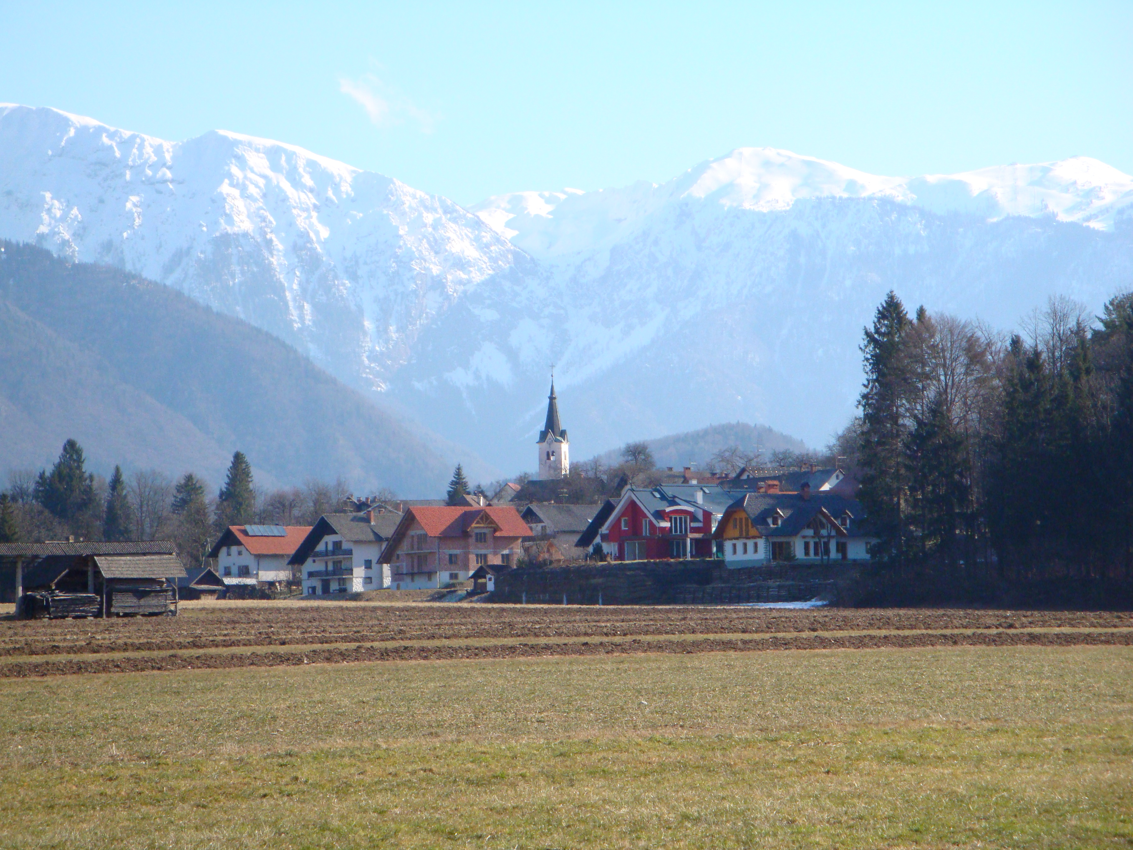 Srednja Bela z Belskega polja februarja 2009